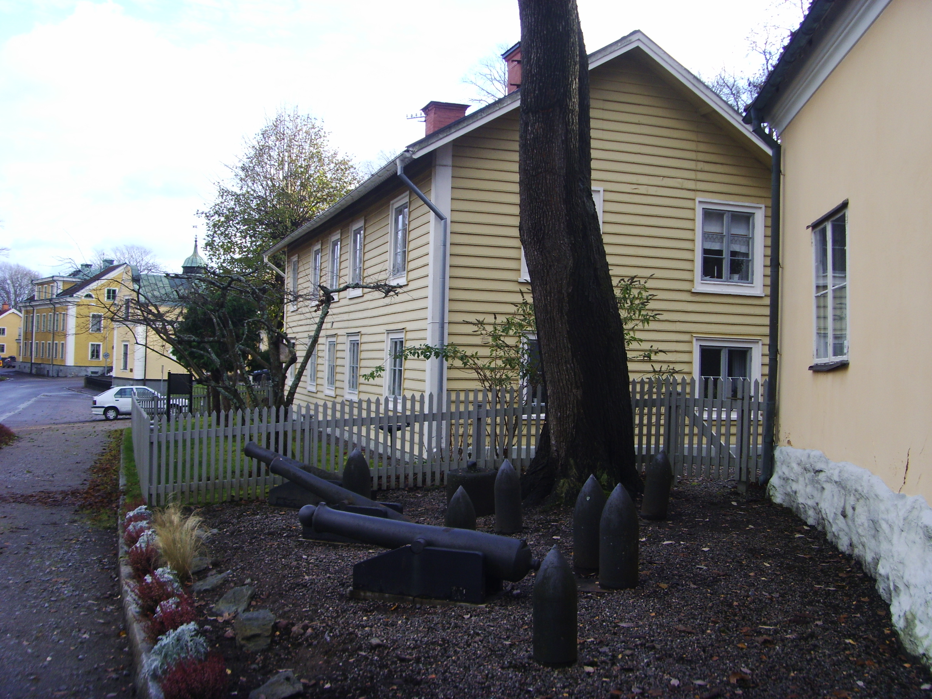 Finspångs bruksmuseum. Huset byggdes 1755 som dagsverksstuga. Här bodde bl a de från Dalarna hitkomna sten- och träarbetare som 1776 byggde Hällestadsbron och 1824-1826 byggde en ny masugn med två pipor. Huset är sedan 1951 bruksmuseum. Det speglar främst järnbrukstiden mellan 1827-1860. Där finns bl a en stor samling konstgjutna föremål tillverkade under ledning av den tyske konstgjutaren Carl Mertens som kom till Finspång 1827. Muren framför museet pryds av av Carl Ekmans sigill och tre mörsare, i närheten finns tre mindre kanoner också uppställda.